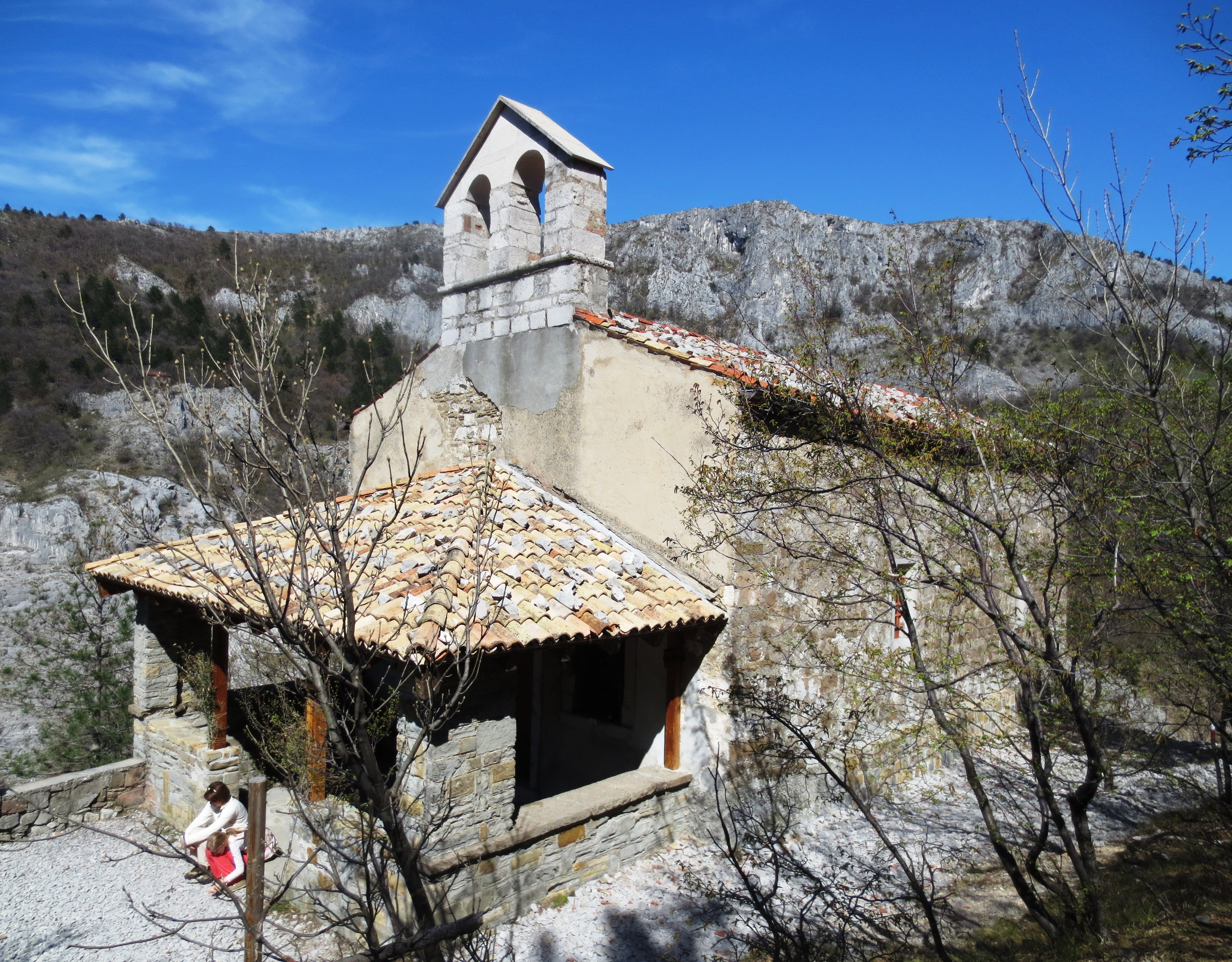 La chiesetta di Santa Maria in SiarisSlovenščina: sv. Marija v Pečeh, dolina Glinščice